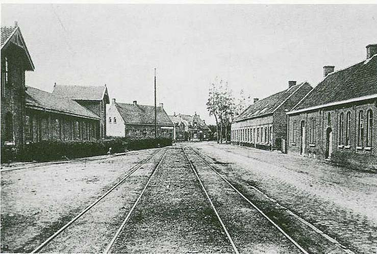 Oude tramstelplaats (links) - Kapelstraat - Ursel - Knesselare - Oost-Vlaanderen - België